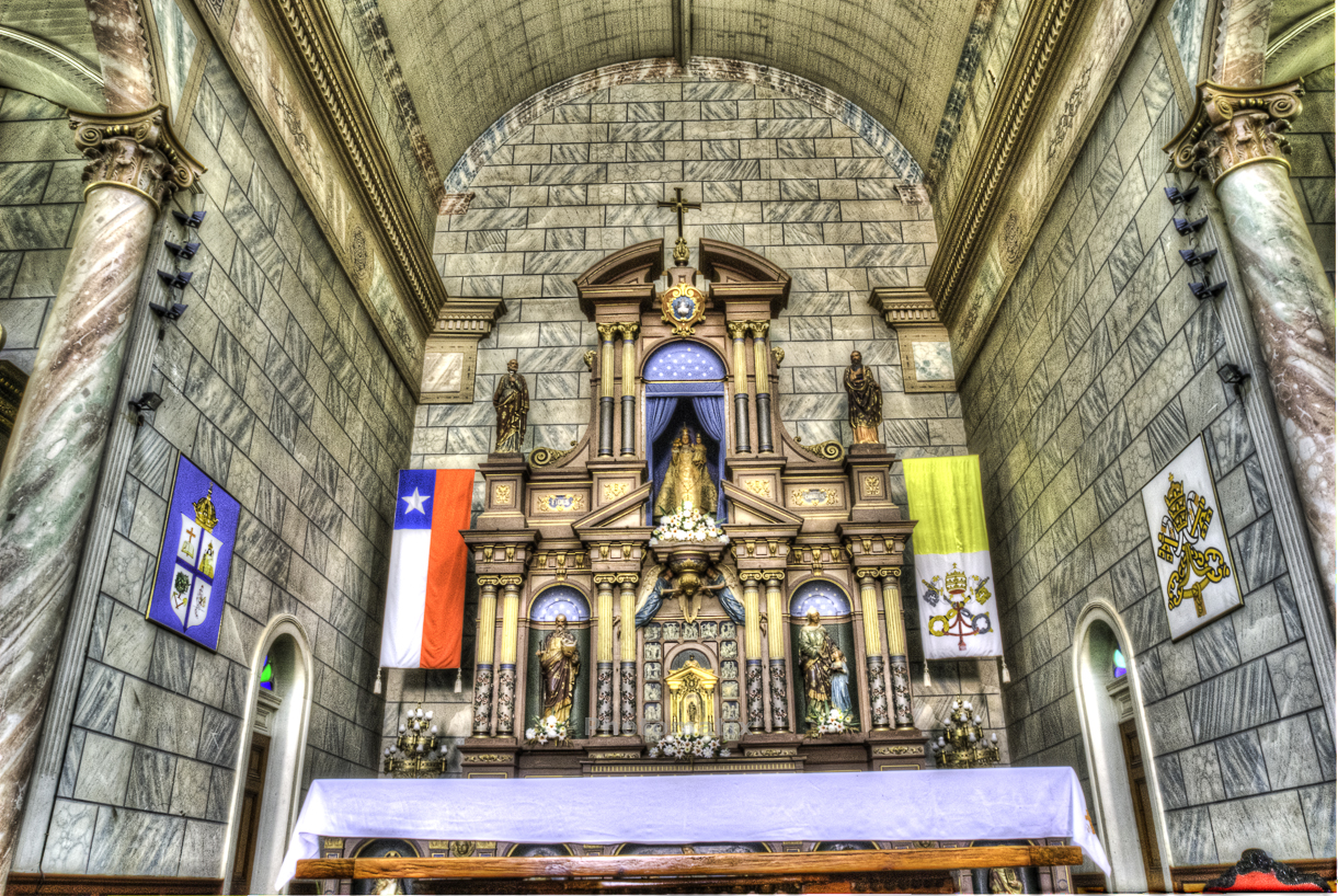 Altar principal Iglesia grande de Andacollo This is a photo of a national monument in Chile: 604